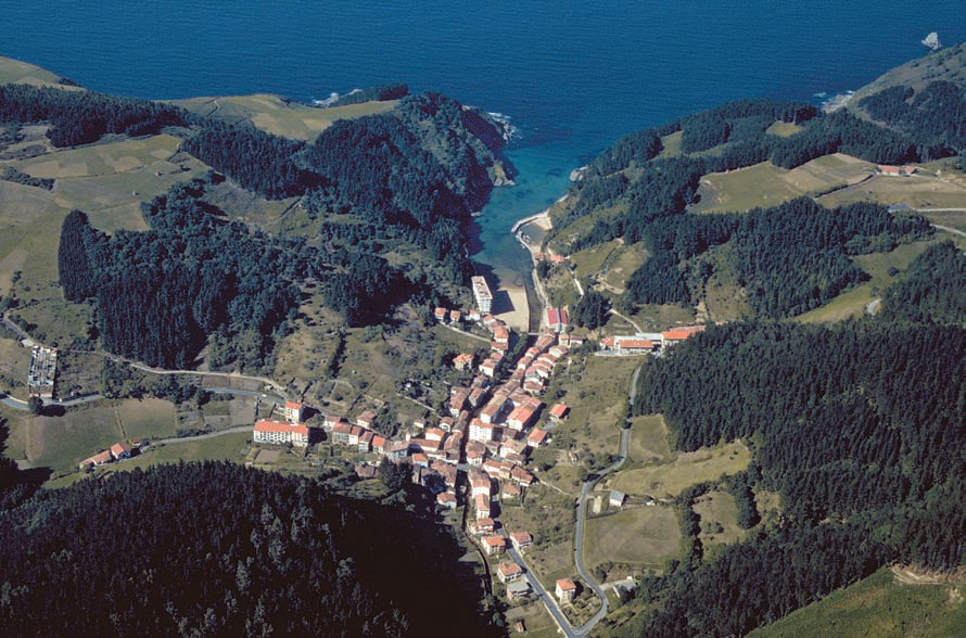 Eako ikuspegia